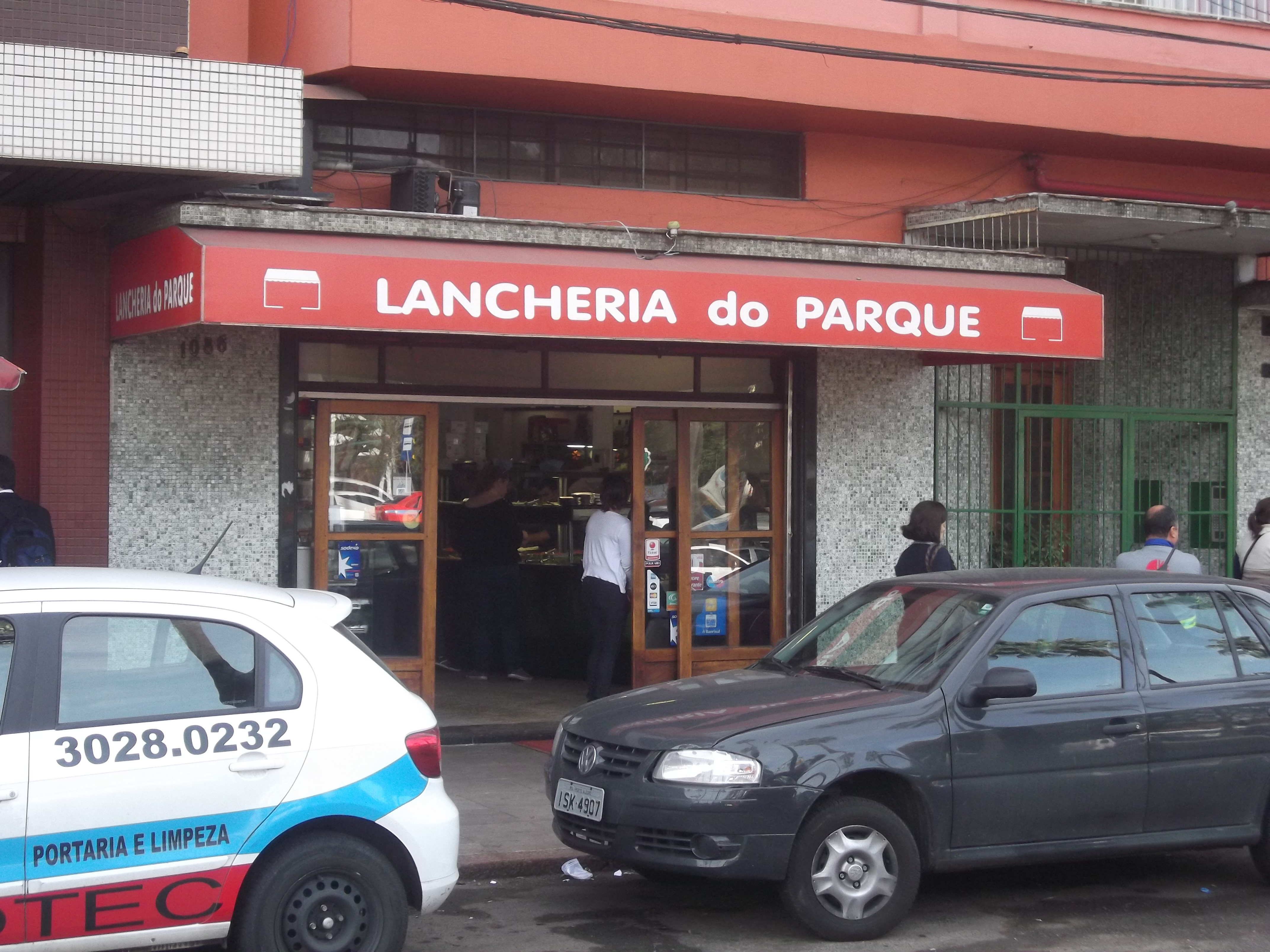 Lancheria do Parque, Avenida Osvaldo Aranha n1086, Porto Alegre, Brasil